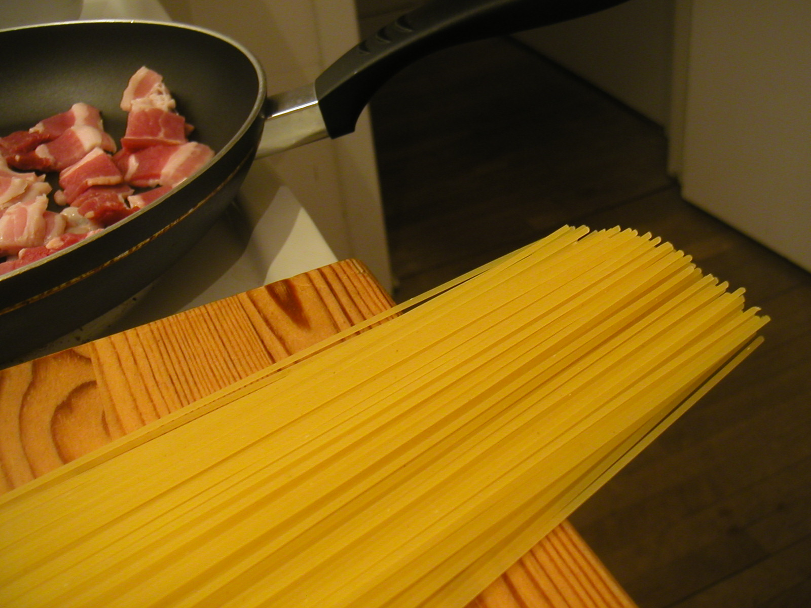 Bacon og spaghetti